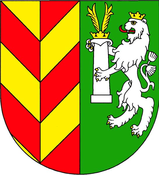 Znak obce Velký Valtinov